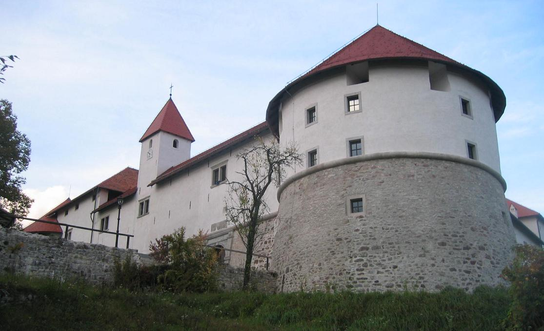 Turjak castle, Slovenia photo:Ziga 06:21, 26 October 2006 (UTC)